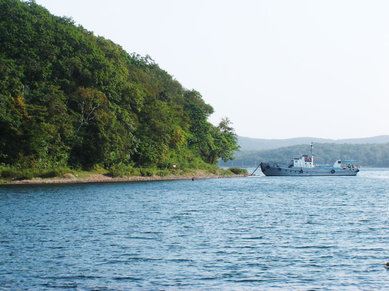 Русский остров, бухта Новик, 18.09.2005.